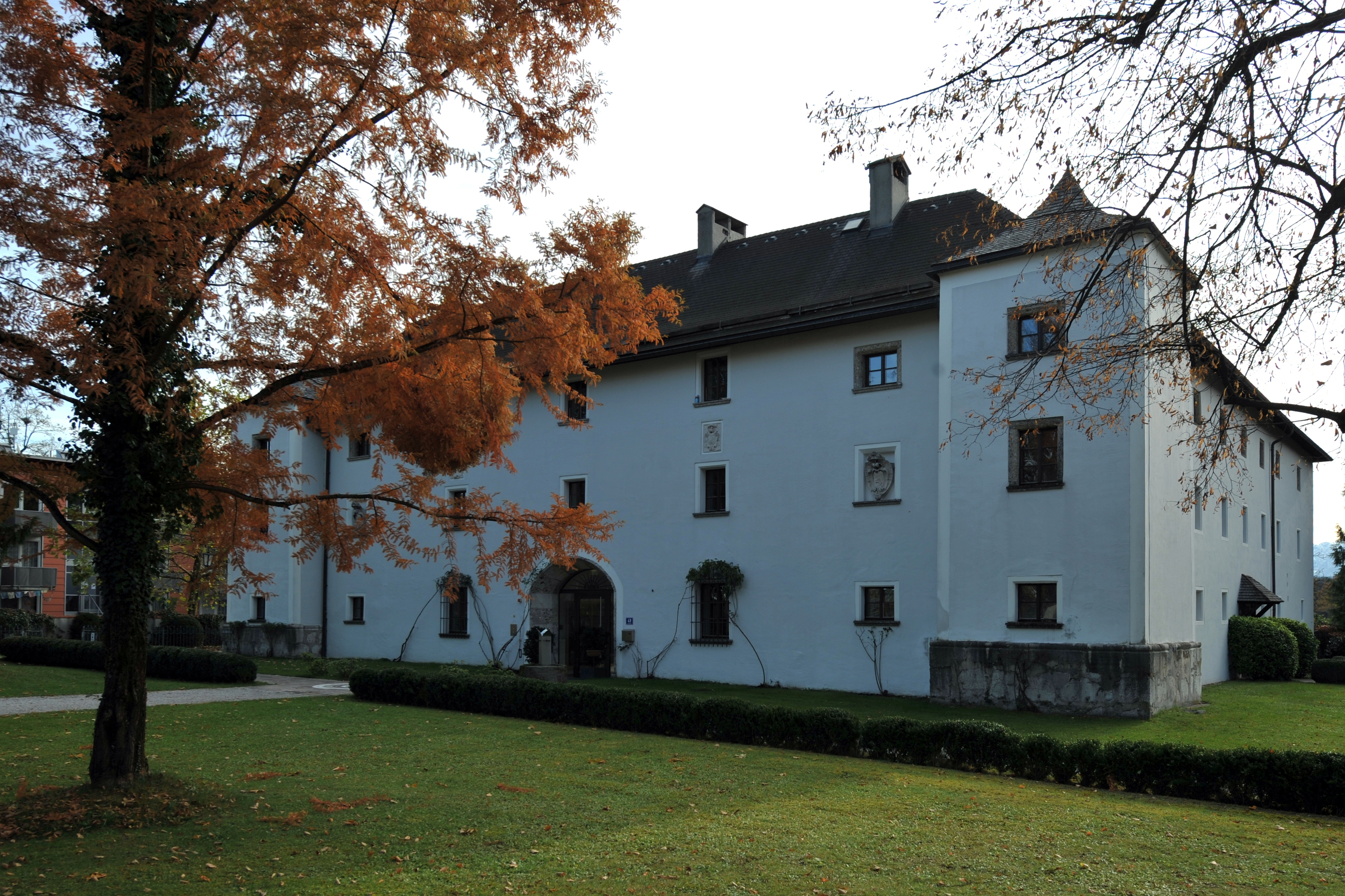 Schloss Rif, Landessportzentrum The making of this work was supported by Wikimedia Austria. For other files made with the support of Wikimedia Austria, please see the category Supported by Wikimedia Österreich.